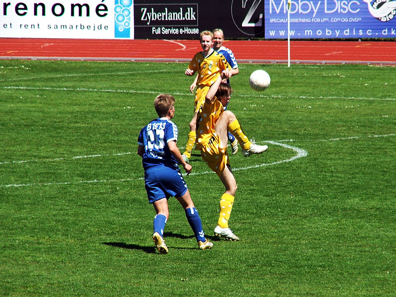 FC Zulu spiller mod pigerne fra B1913